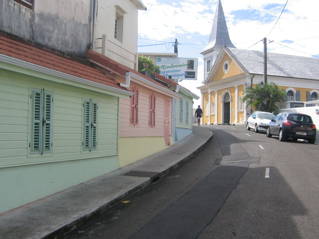 Une rue de Grand-Rivière (nord de la Martinique)